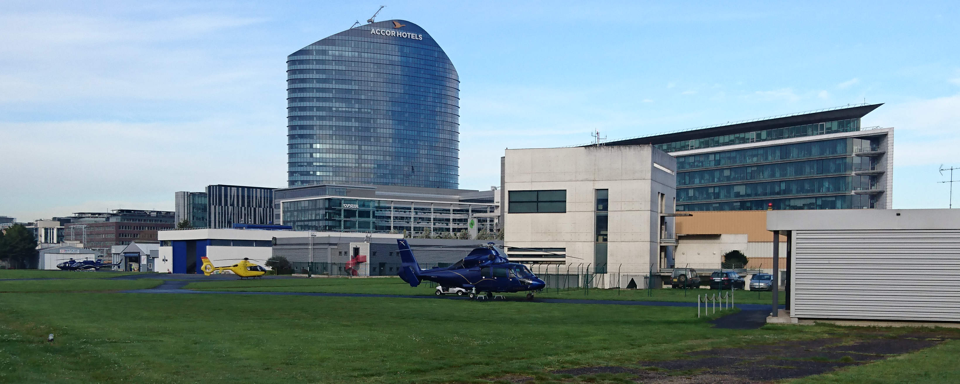 Héliport d'Issy les Moulineaux. L'hélicoptère bleu est immatriculé F-HUGO. C'est un SA 365 N construit par Eurocopter. Son propriétaire est GO FAST TRANSPORT. En arrière plan, Accor hotel et la DGAC.